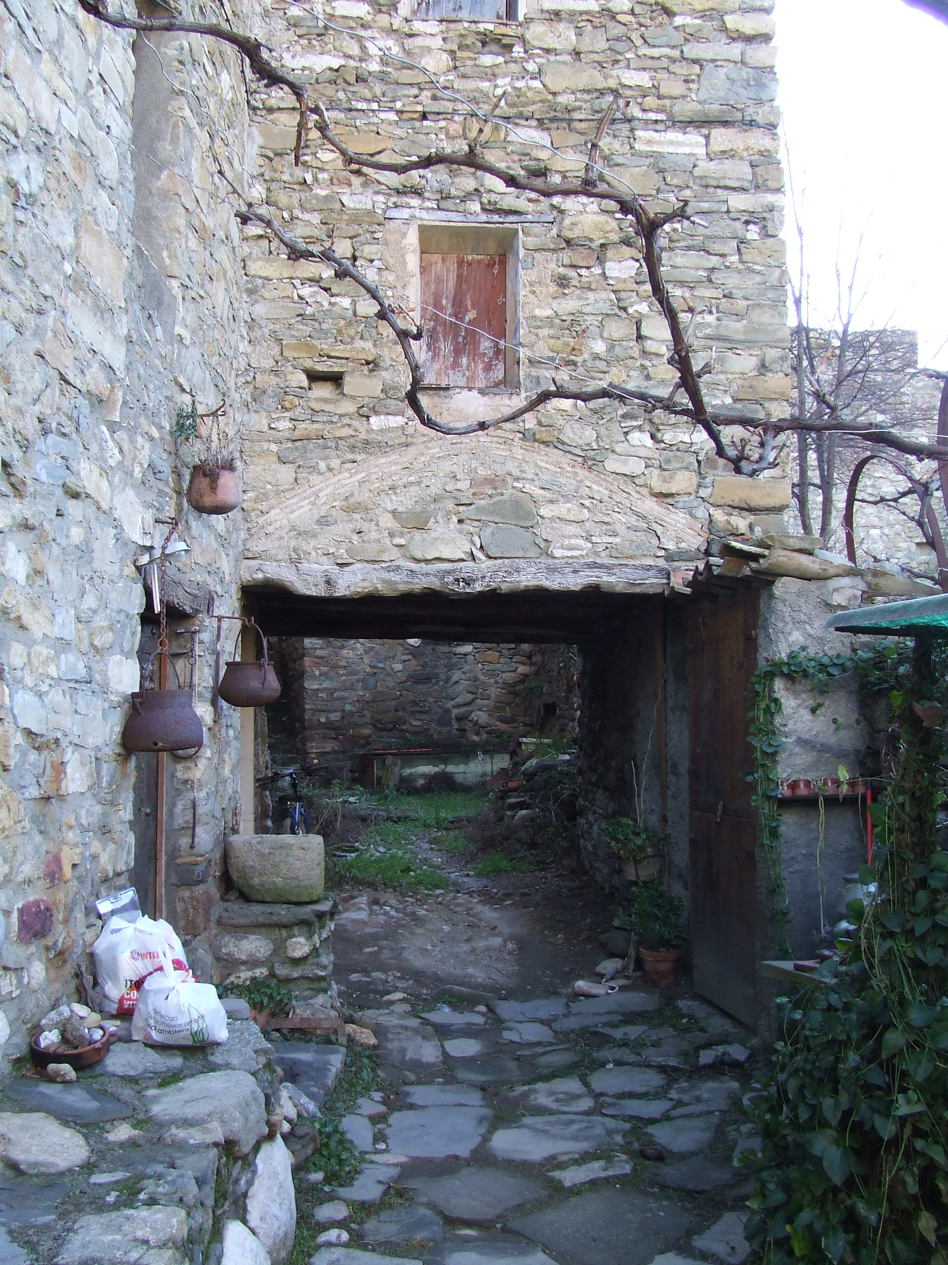 El poble d'Eroles. Un dels passos del clos del poble (Fígols de Tremp, Tremp, Pallars Jussà)